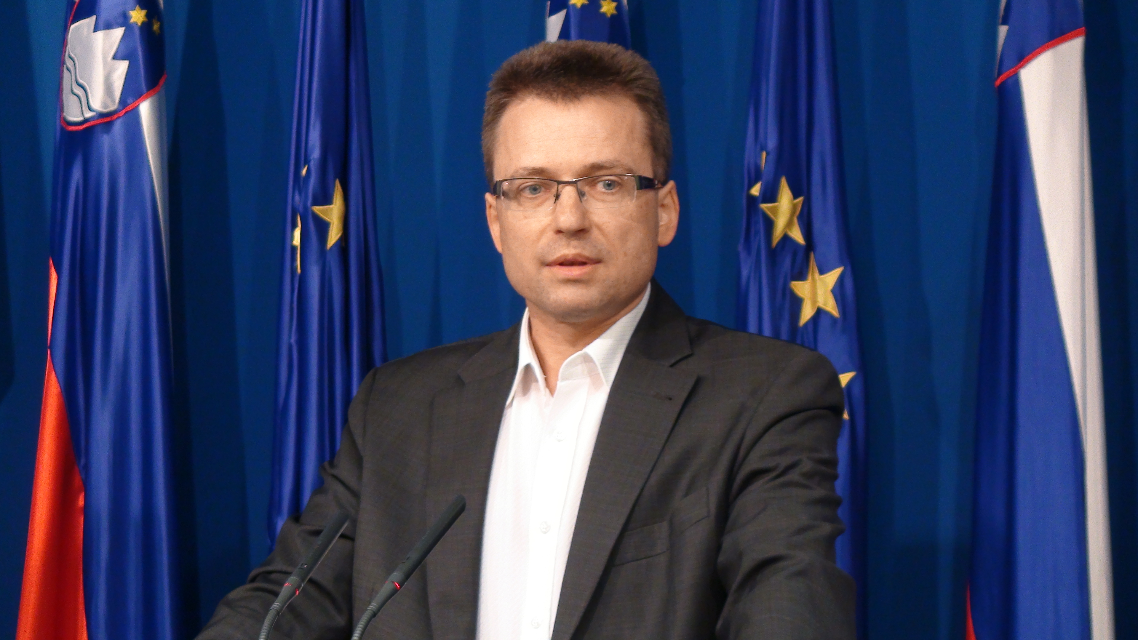 Na novinarski konferenci sta nastopila minister za infrastrukturo in prostor Zvonko Černač in direktor Urada za makroekonomske analize in razvoj Boštjan Vasle.